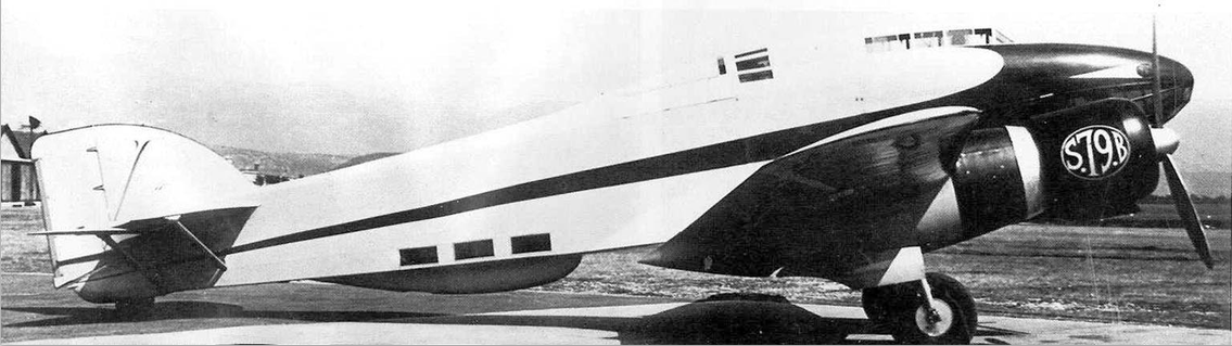 Savoia Marchetti SM.79 B prototipo